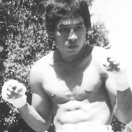 nilar_win.jpg